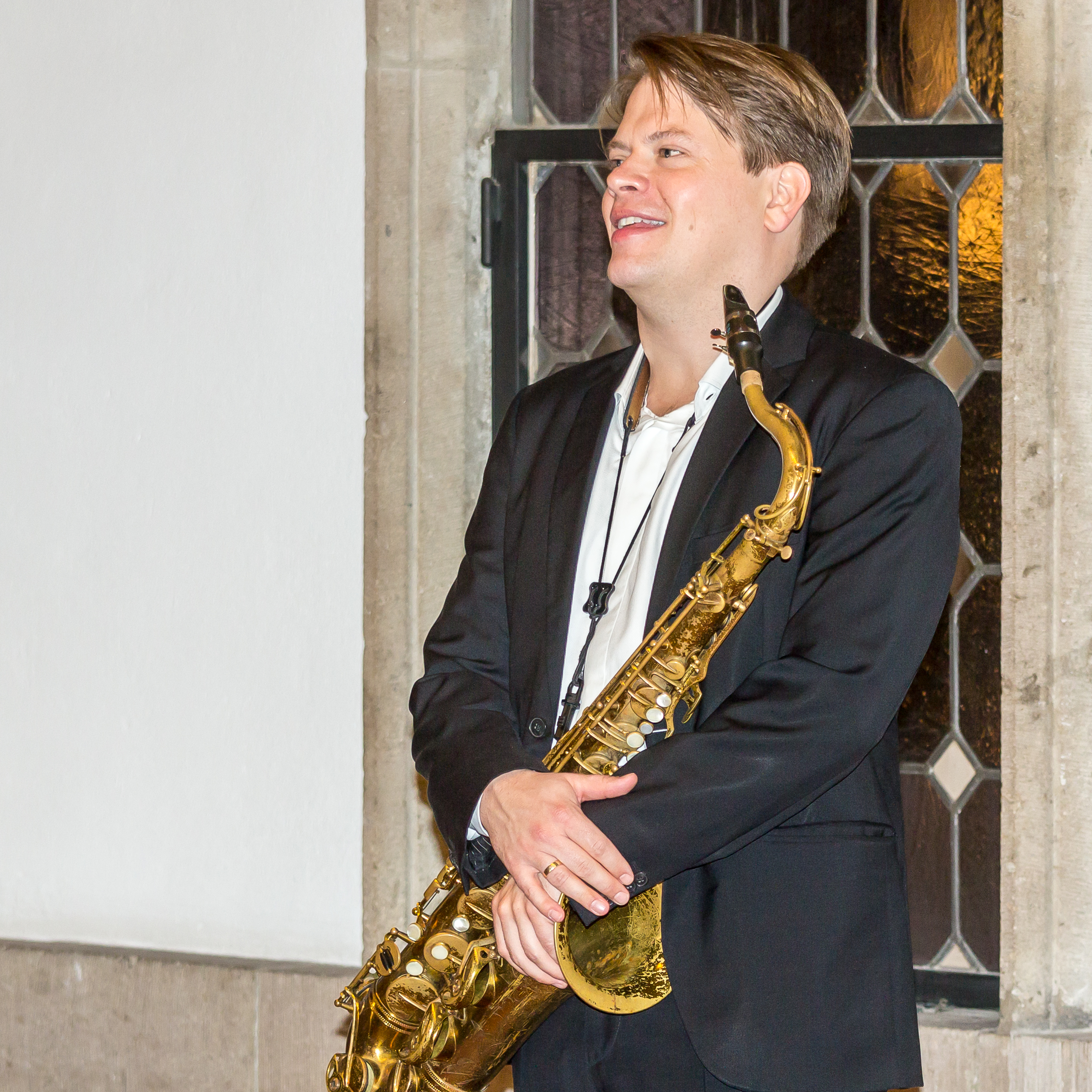 Empfang für Fritz Schramma im Kölner Rathaus zum 70. Geburtstag zu einem Jazz-Aperitif Musiker: Denis Gäbel (Saxophon)